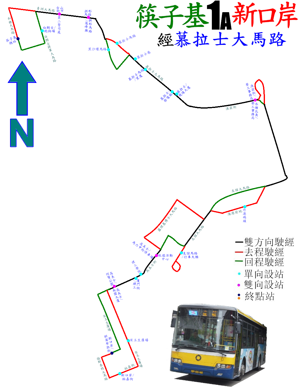 中文（香港）: 澳門巴士1A路公車的走線圖